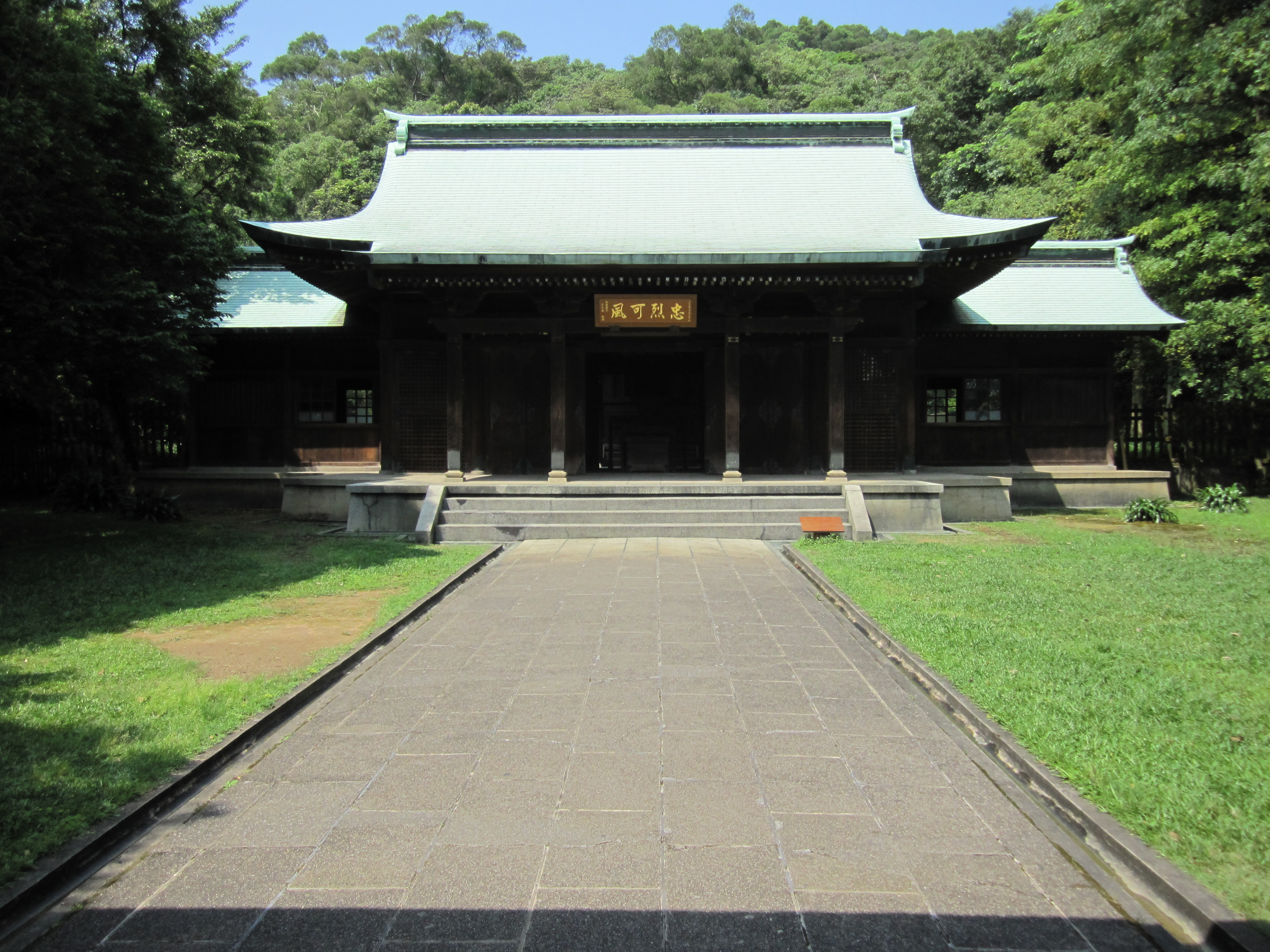 桃園神社-拜殿